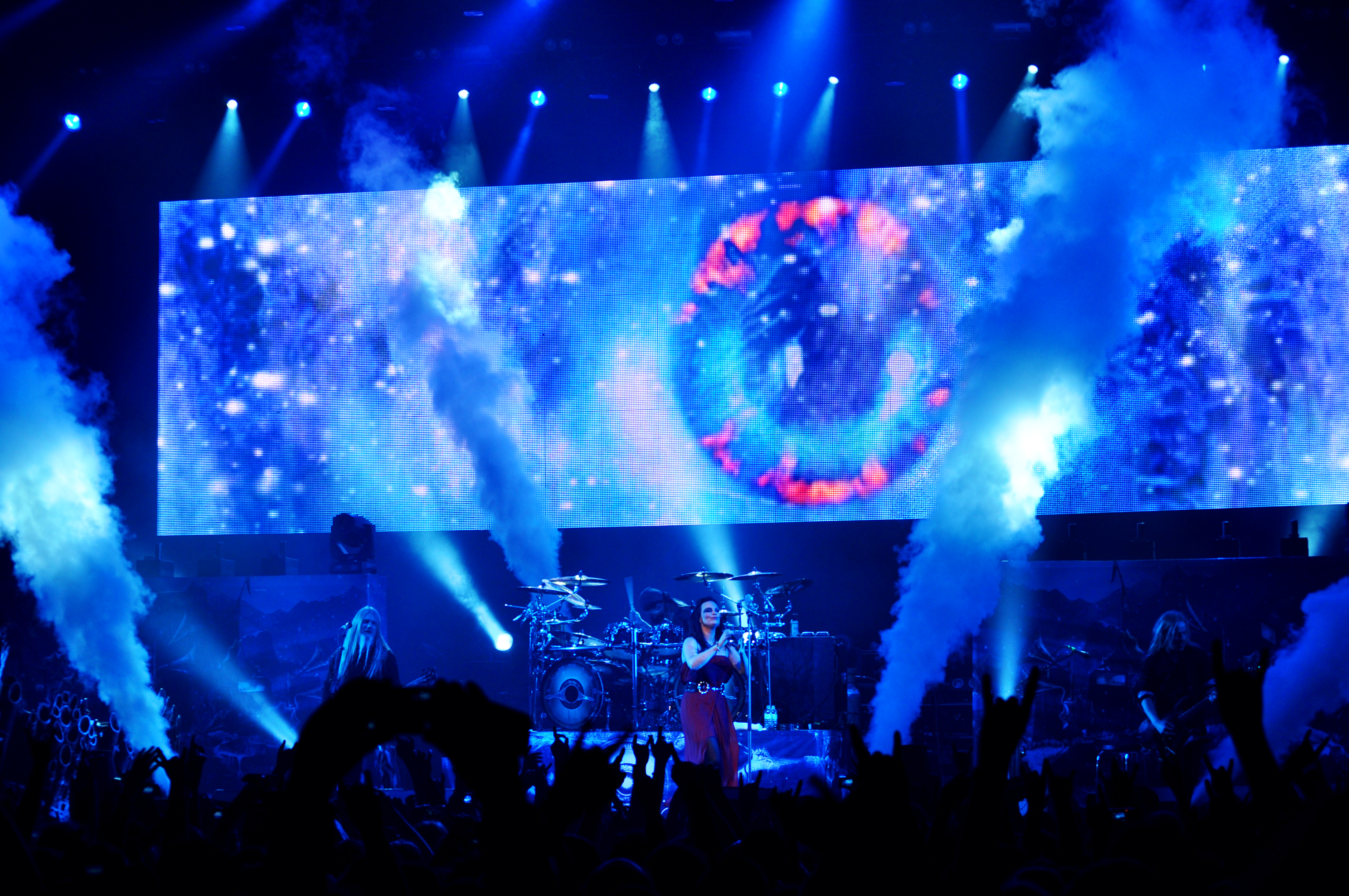 Nightwish en concert, Nantes 2012